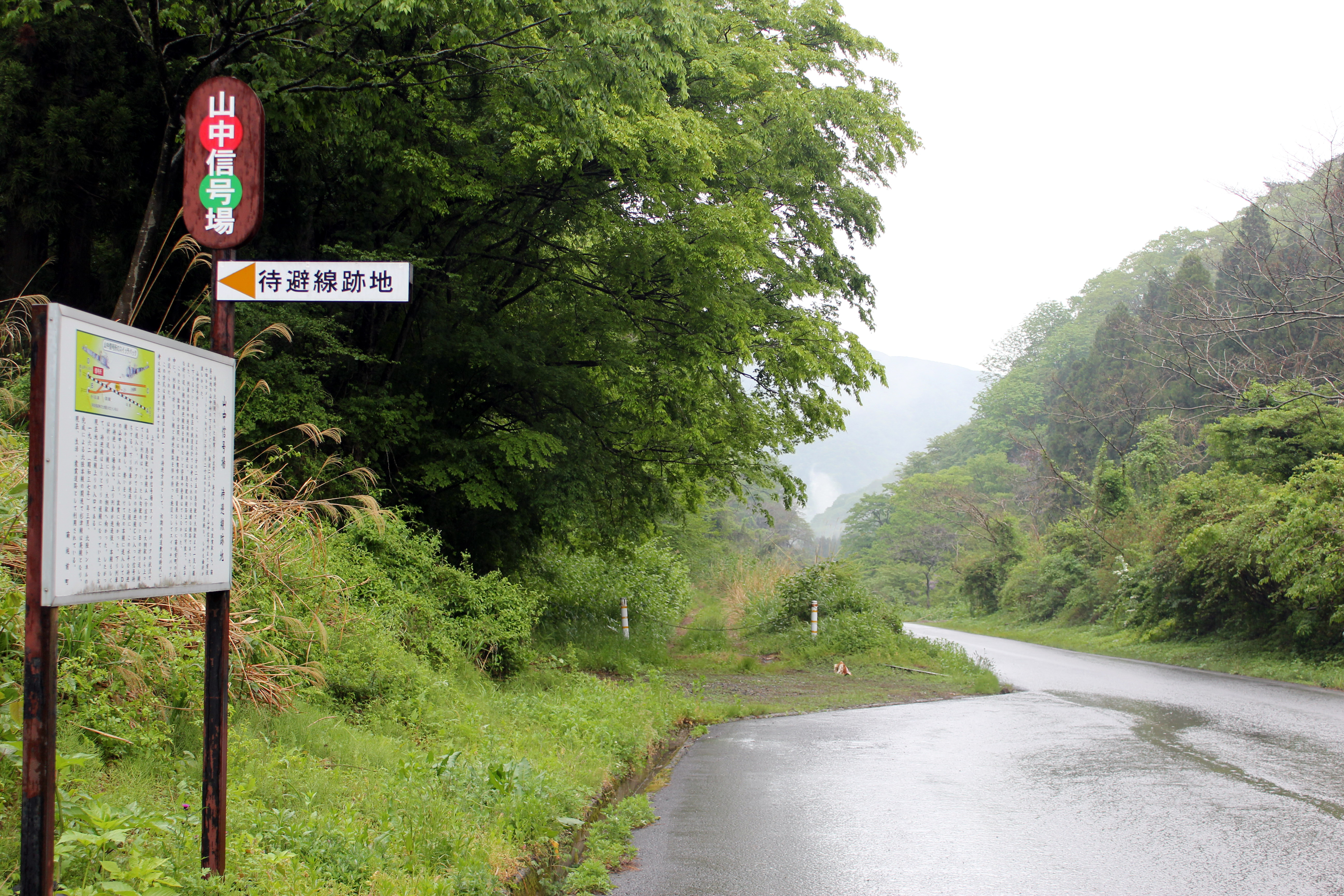 山中信号所待避線跡